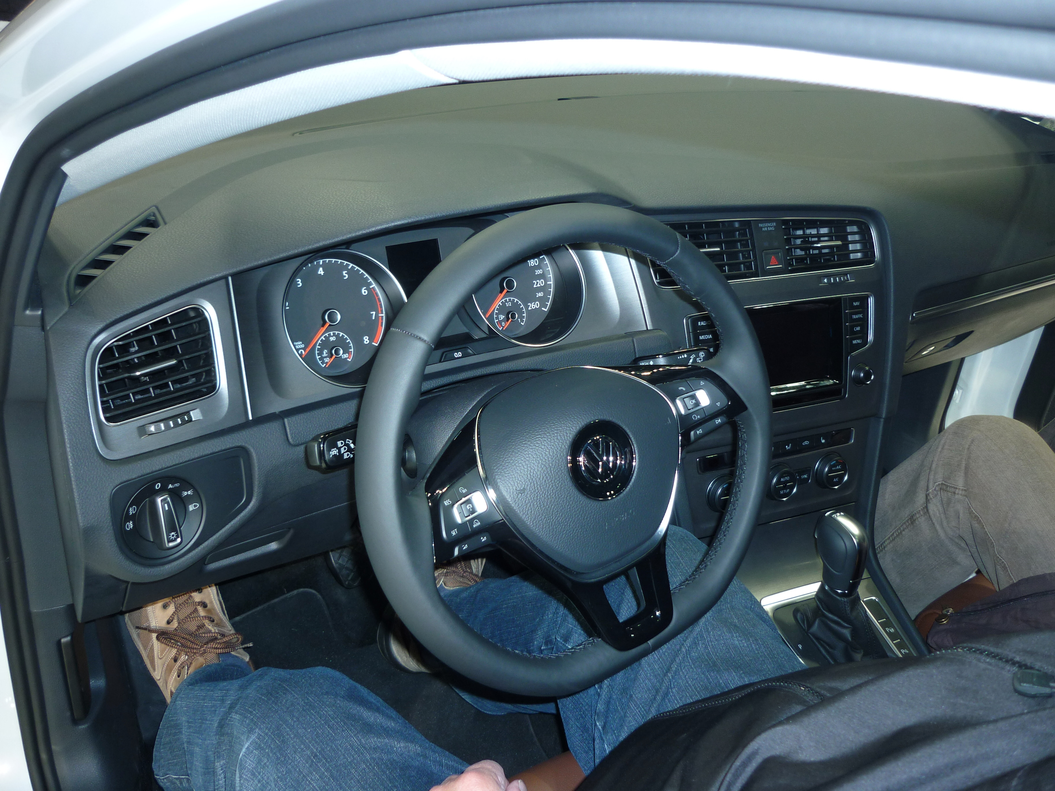 Autostadt Wolfsburg